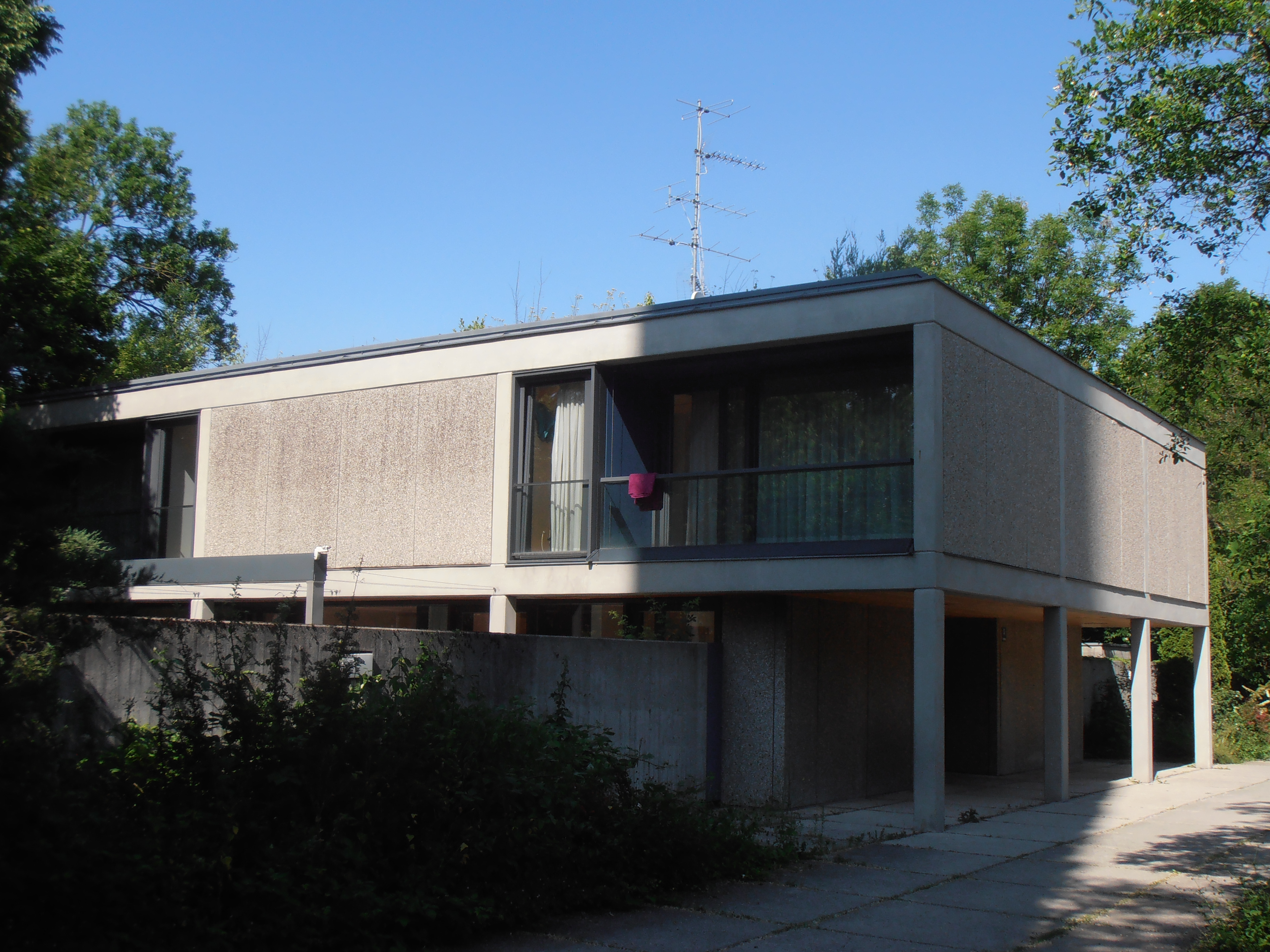 St. Mauritius (München) Pfarrhaus